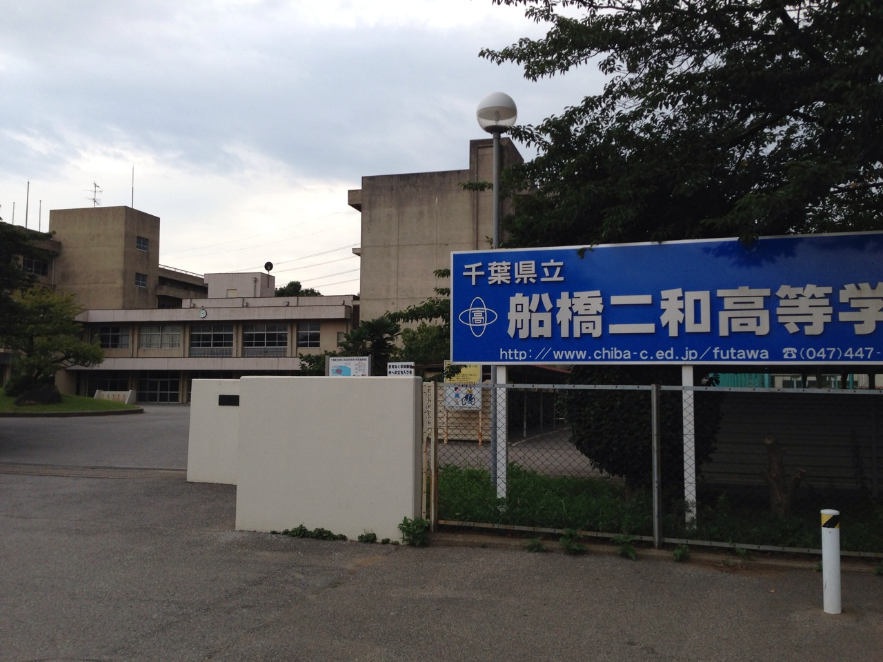 千葉県立二和高等学校